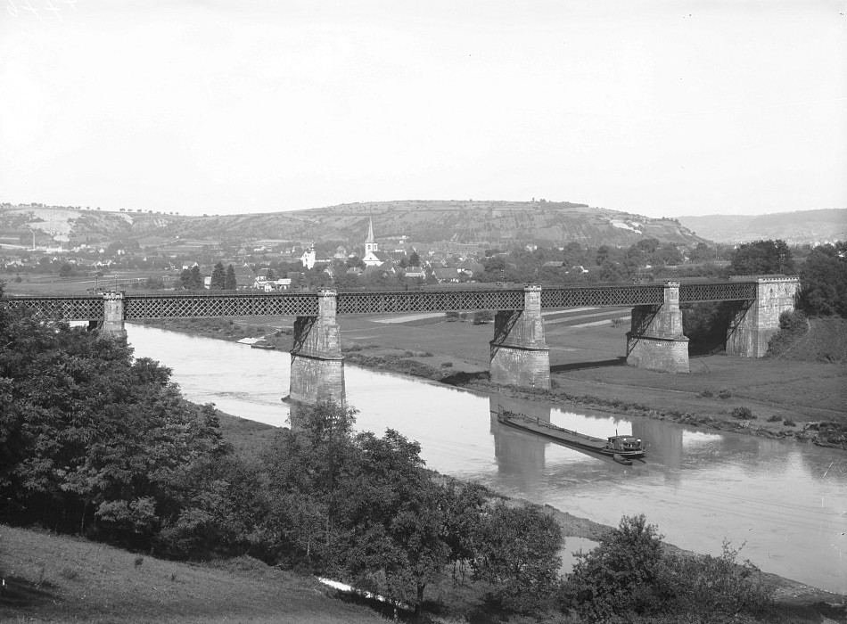 Neckarelz, Eisenbahnbrücke über den Neckar. Blick über den Neckar. Im Hintergrund liegt Neckarelz. Die im Bild noch vorhandene Eisenbahnbrücke wurde im Zweiten Weltkrieg von deutschen Soldaten gesprengt.